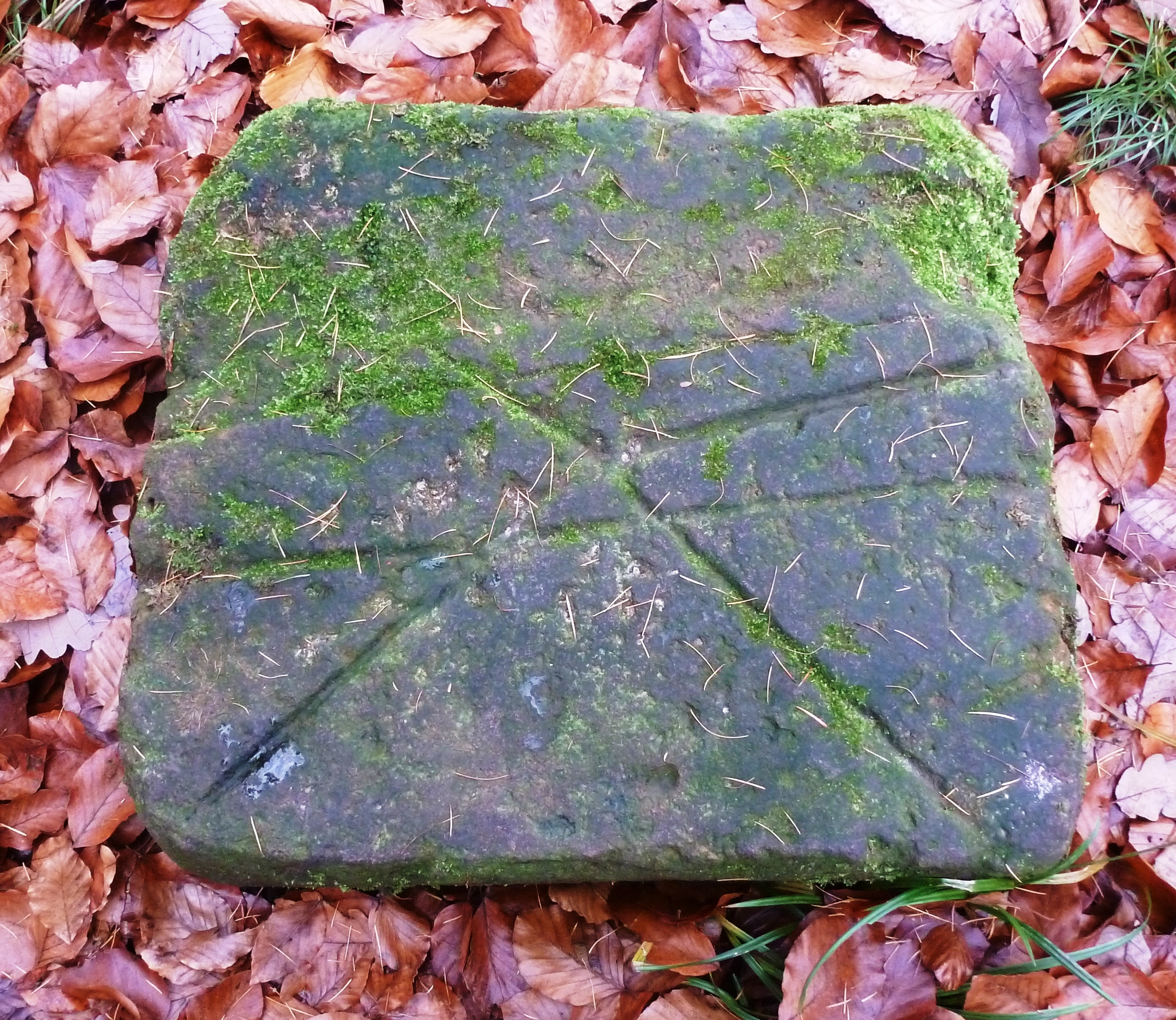 Viermärker (Grenzstein) in Breuberg-Sandbach